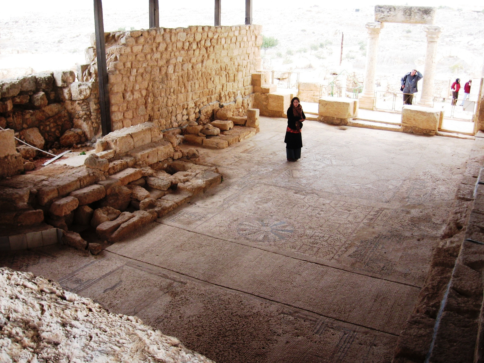 Susia synagoque